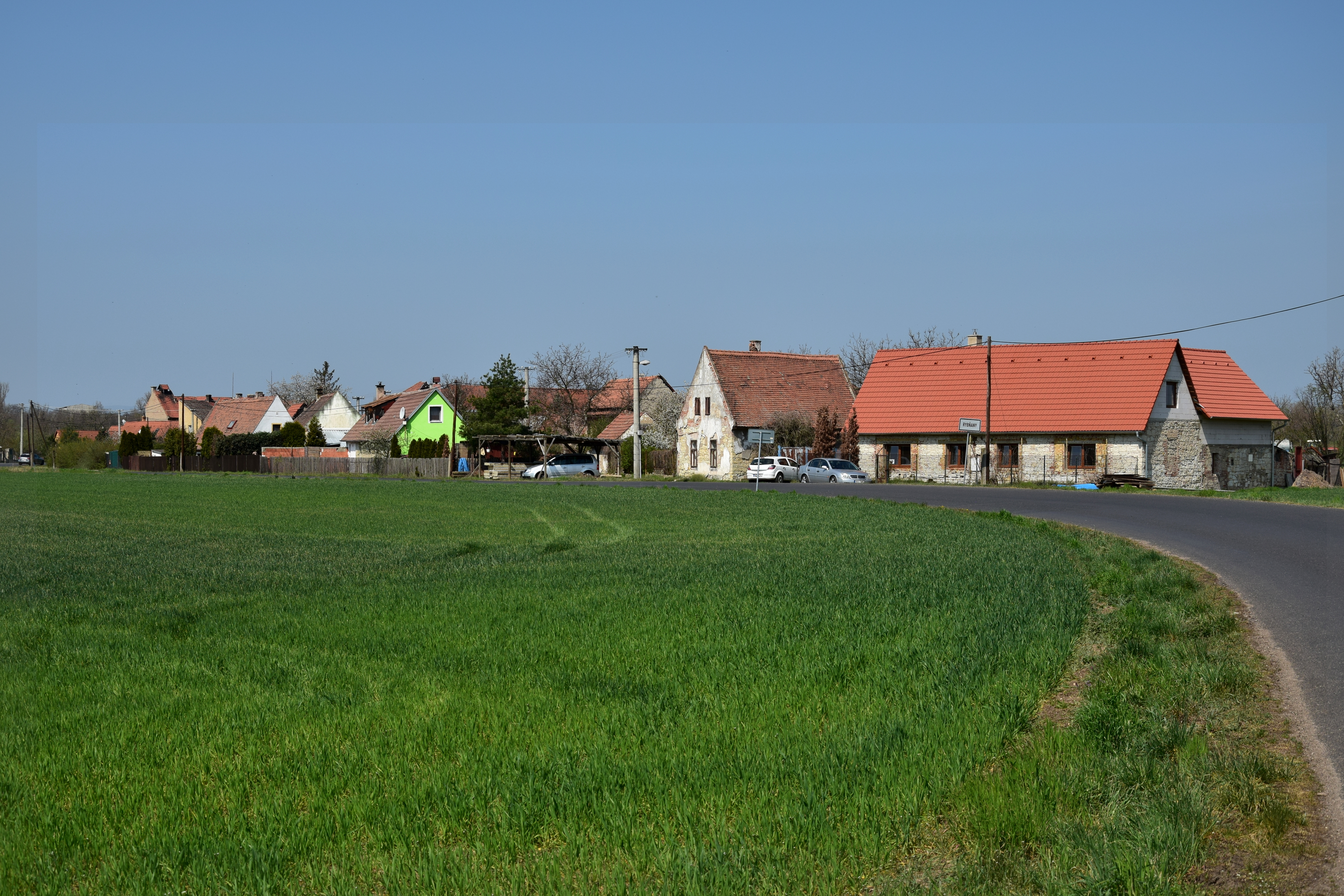 Rybňany – pohled od jihovýchodu